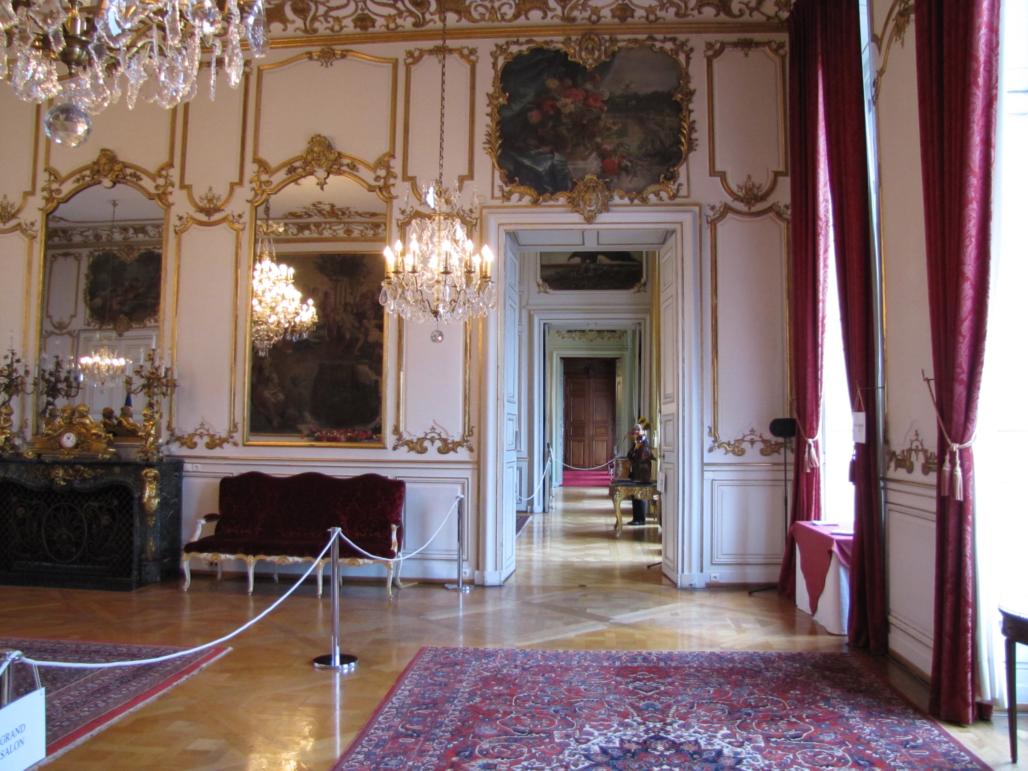 Alsace, Bas-Rhin, Strasbourg, Ancien Hôtel des Comtes de Hanau-Lichtenberg (1736), puis Hôtel de Ville, place Broglie et 9 rue Brûlée.